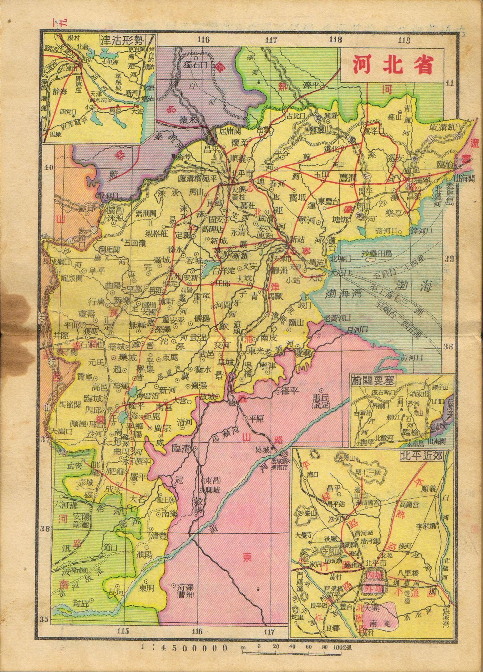 中文（中国大陆）: 亚新地学社1936年《袖珍中华全图》河北省